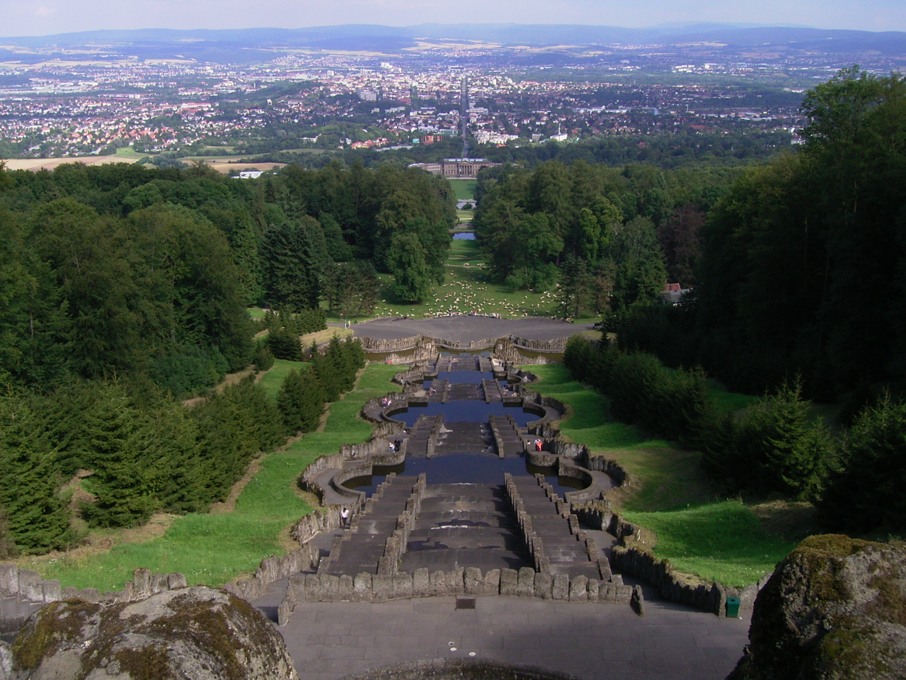 Bergpark wilhelmshoehe plutogrotte mit teufelsbruecke, 2005